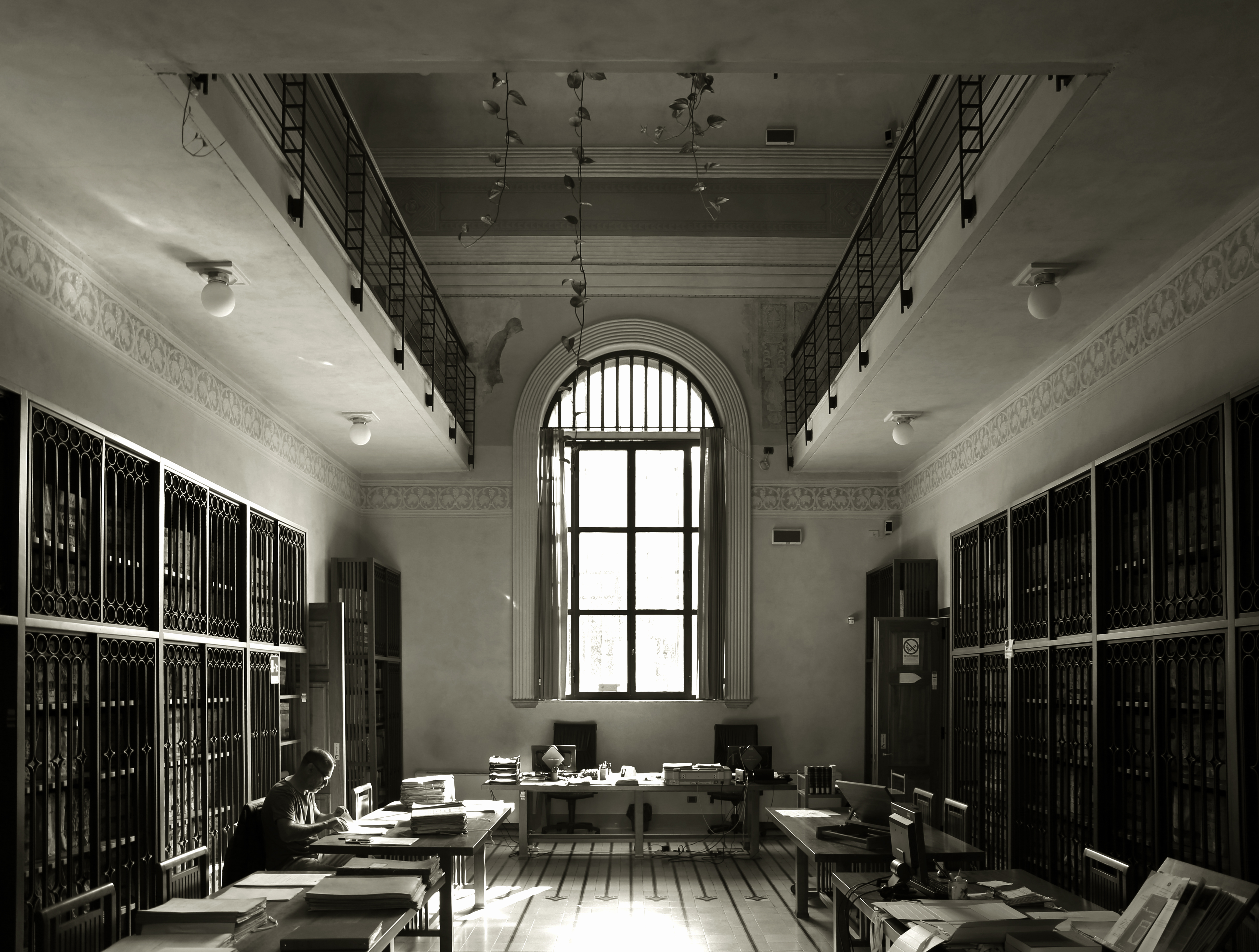 Sezione di Archivio di Stato di Pescia This is a photo of a monument which is part of cultural heritage of Italy.